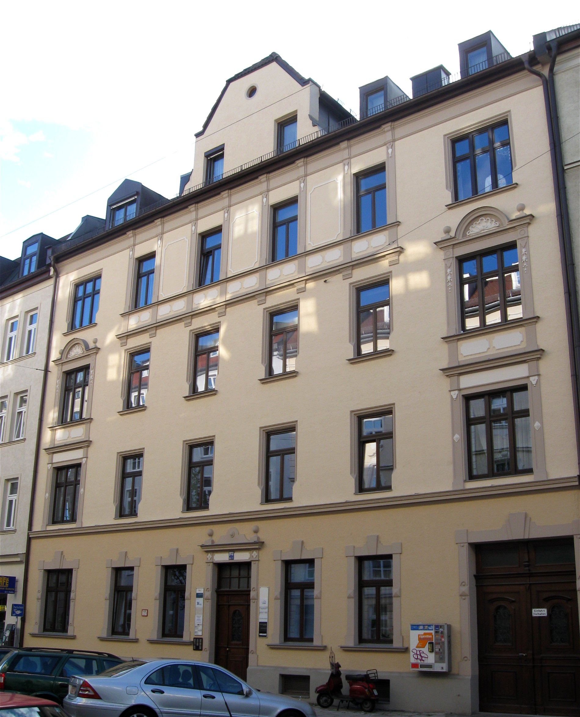 Belfortstraße 3; Mietshaus, deutsche Renaissance, um 1890/1900.